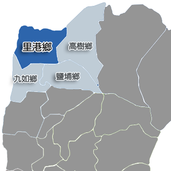 屏東縣里港鄉相對位置。